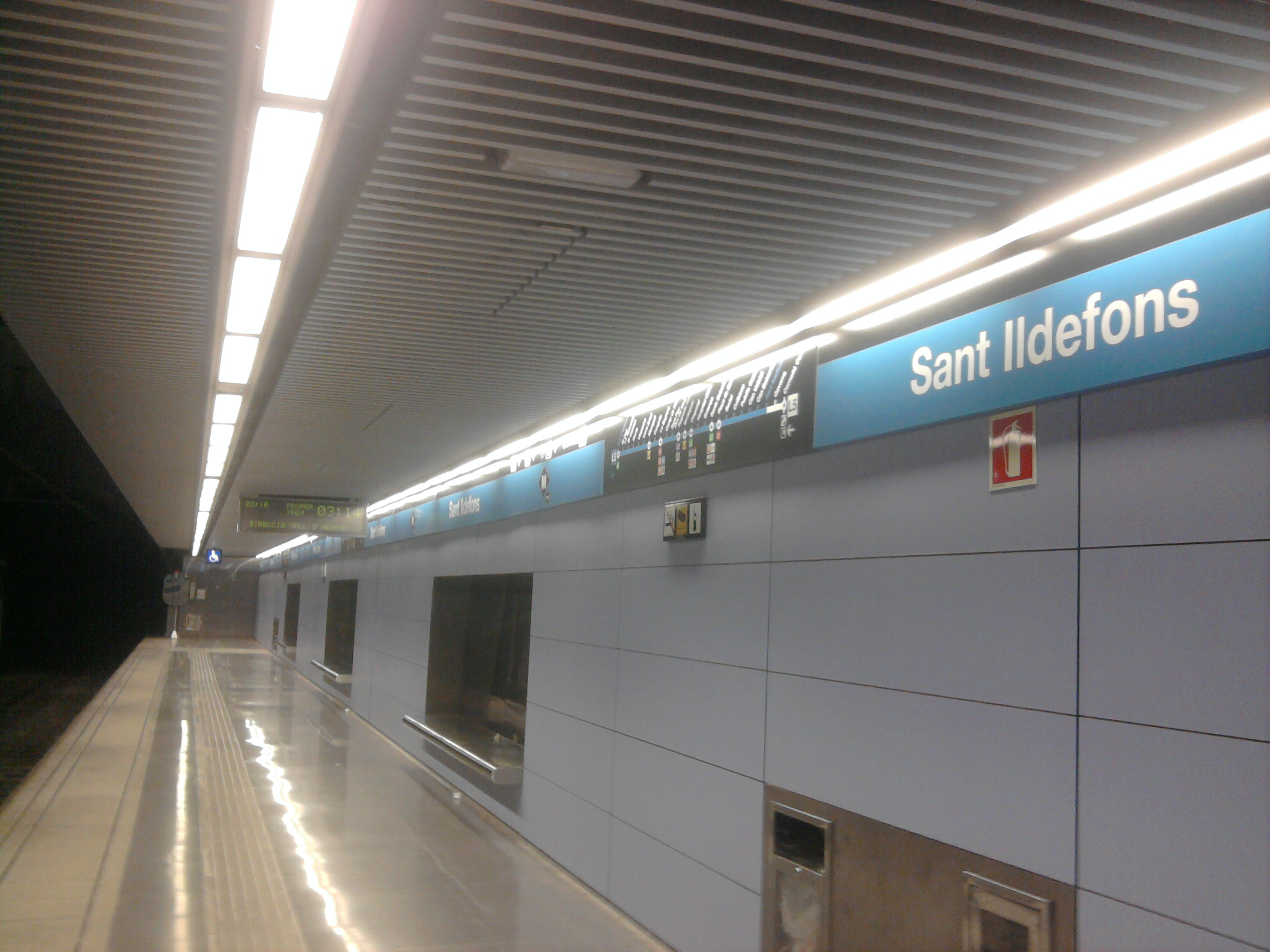 Foto capturada per la meva càmara a l'estació de Sant Ildefons (Metro de Barcelona).